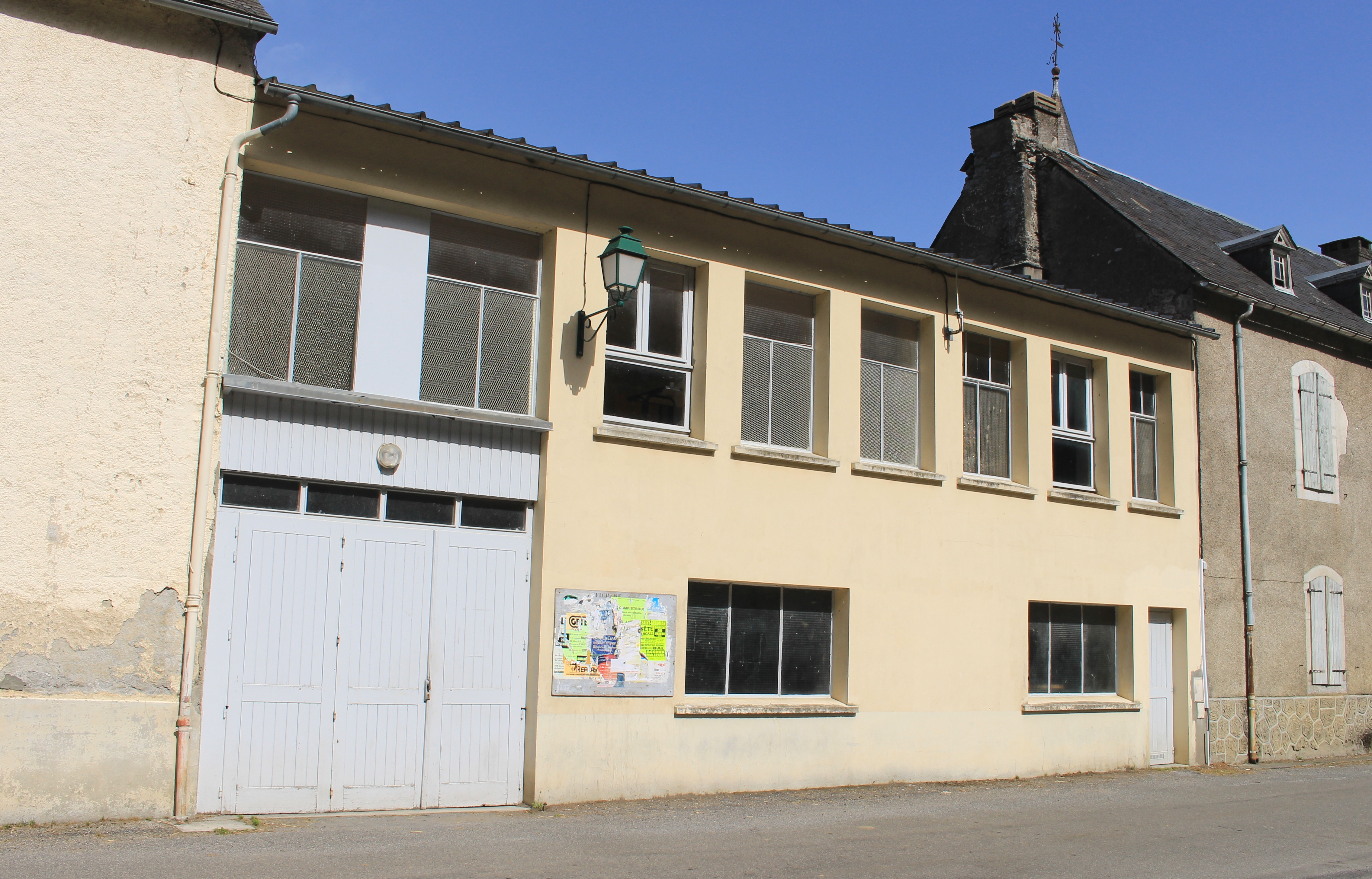 Salle des fêtes de Lortet (Hautes-Pyrénées)